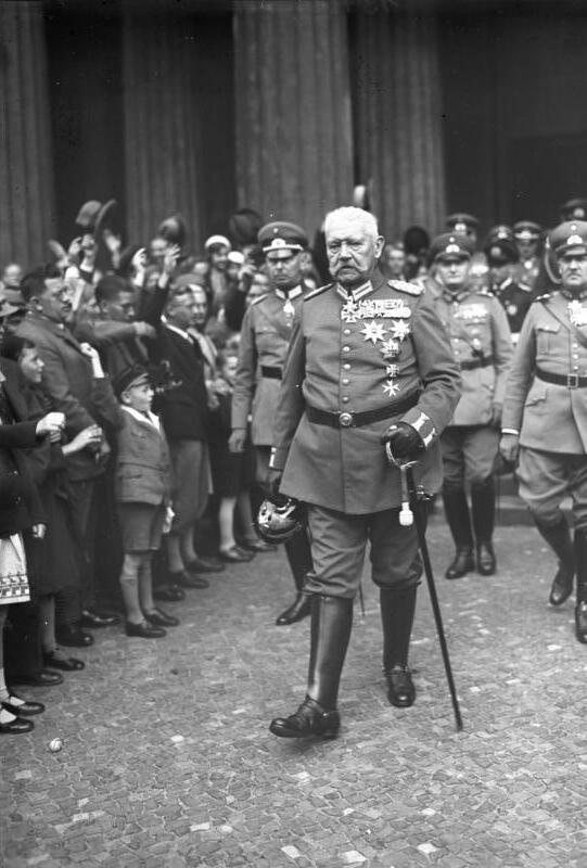 Die erste grosse Geburtstagsfeier des 85 jährigen Reichspräsidenten von Hindenburg in Berlin ! Ergriffen und Barhäuptig verlässt der 85 jährige Reichspräsident von Hindenburg, das Gefallenen-Ehrenmal Unter den Linden. Hinter ihm General von Schleicher.